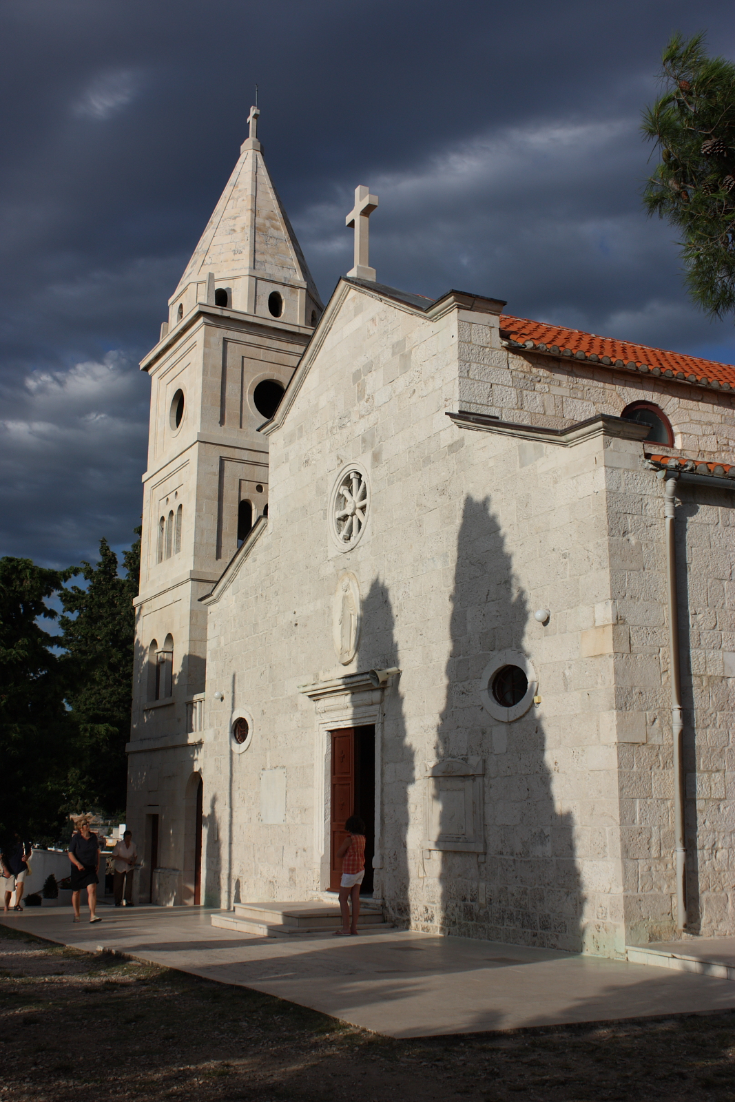 Primosten